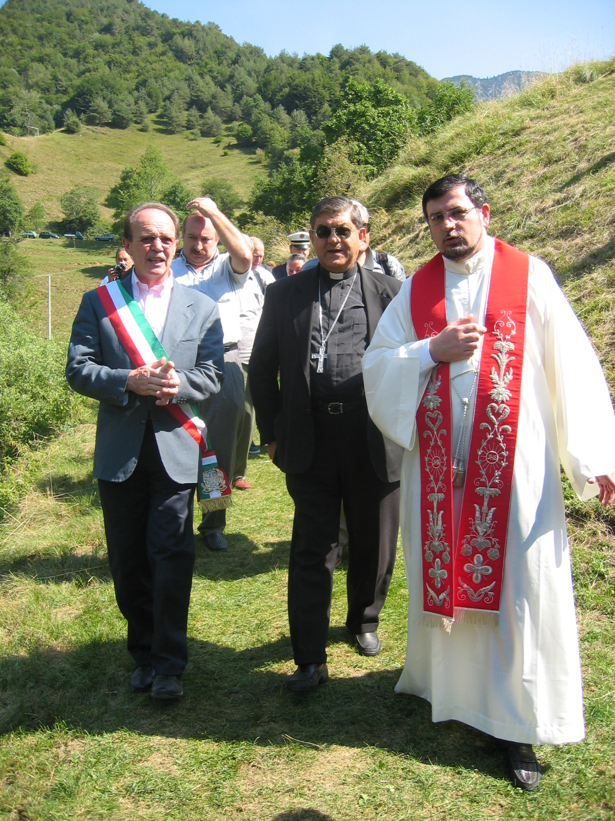 Il cardinale Crescenzio Sepe a Cadria con il sindaco di Magasa, Ermenegildo Venturini, il 10 agosto del 2004 in occasione della festa patronale di San Lorenzo.